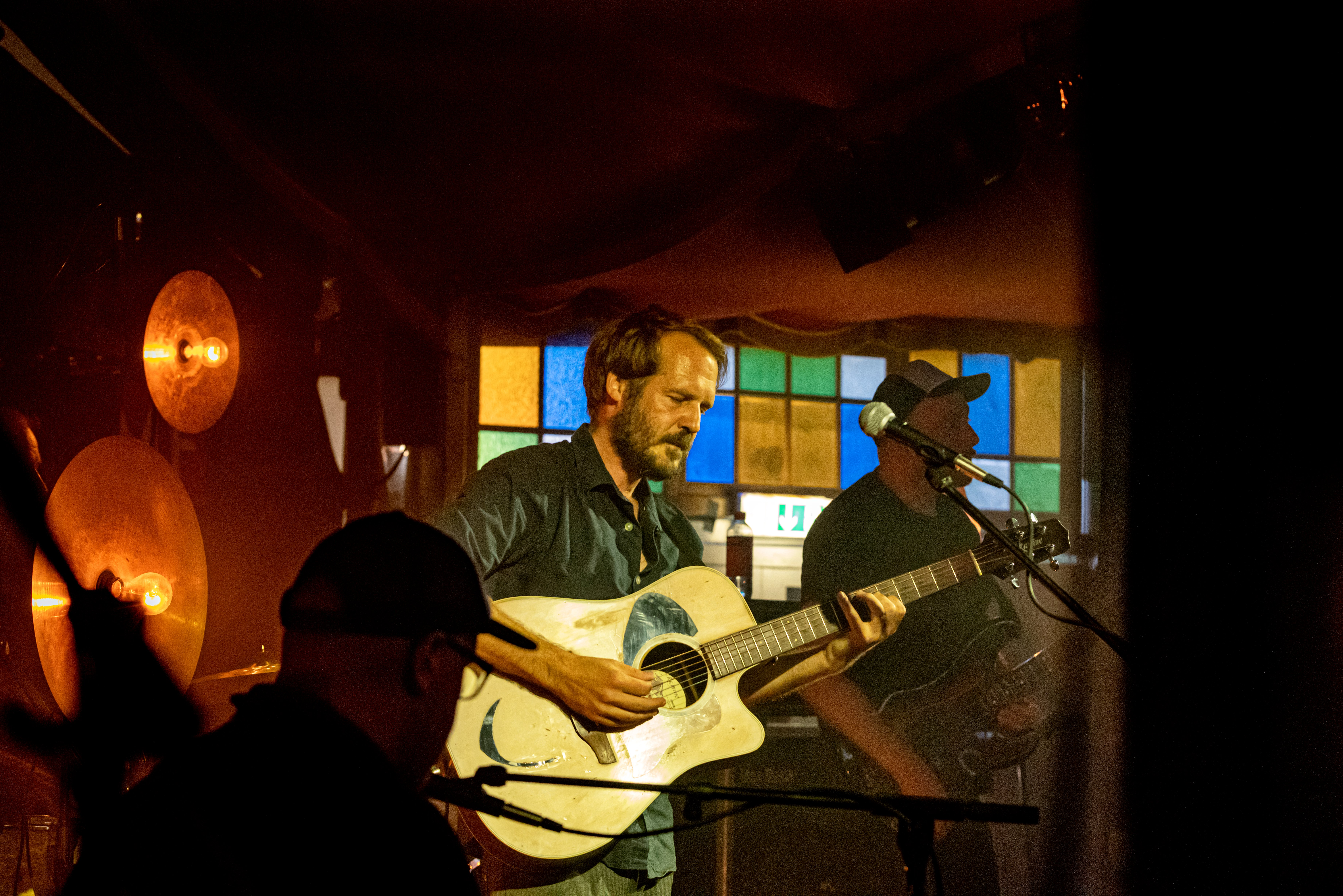 Bilder vom Zelt Musik Festival 2019 in Freiburg im Breisgau Gisbert zu Knyphausen am 04. 08. 2019